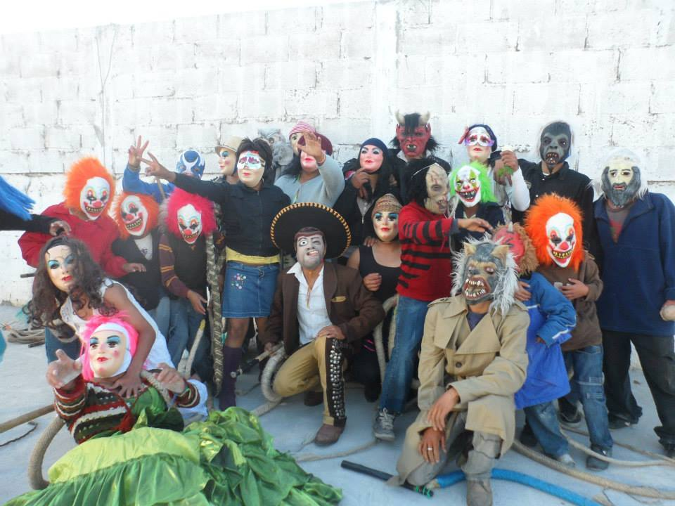 La danza de los Gracejos es, entre otros, la más representativa de las fiestas populares y, sobre todo, de las tradiciones y costumbres de Palmarito Tochapán, cuya tradición es ver hombres disfrazados de diversos personajes que se estremecen con el tronido de sus chirriones, que imitan tanto a mujeres y animales como figuras alegóricas en la que el pueblo confluye y convive la admiración de propios y extraños.